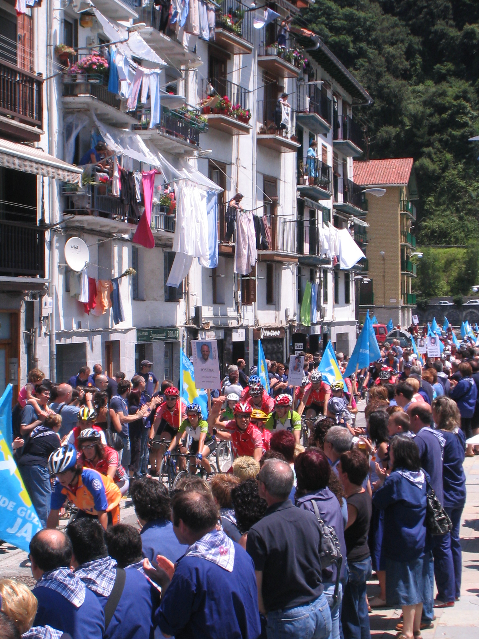 1 Celebración del Zapatu Azule en Ondarroa, llegada de la "Dina Martxi", marcha en bicicleta desde Tolosa a Ondárroa.